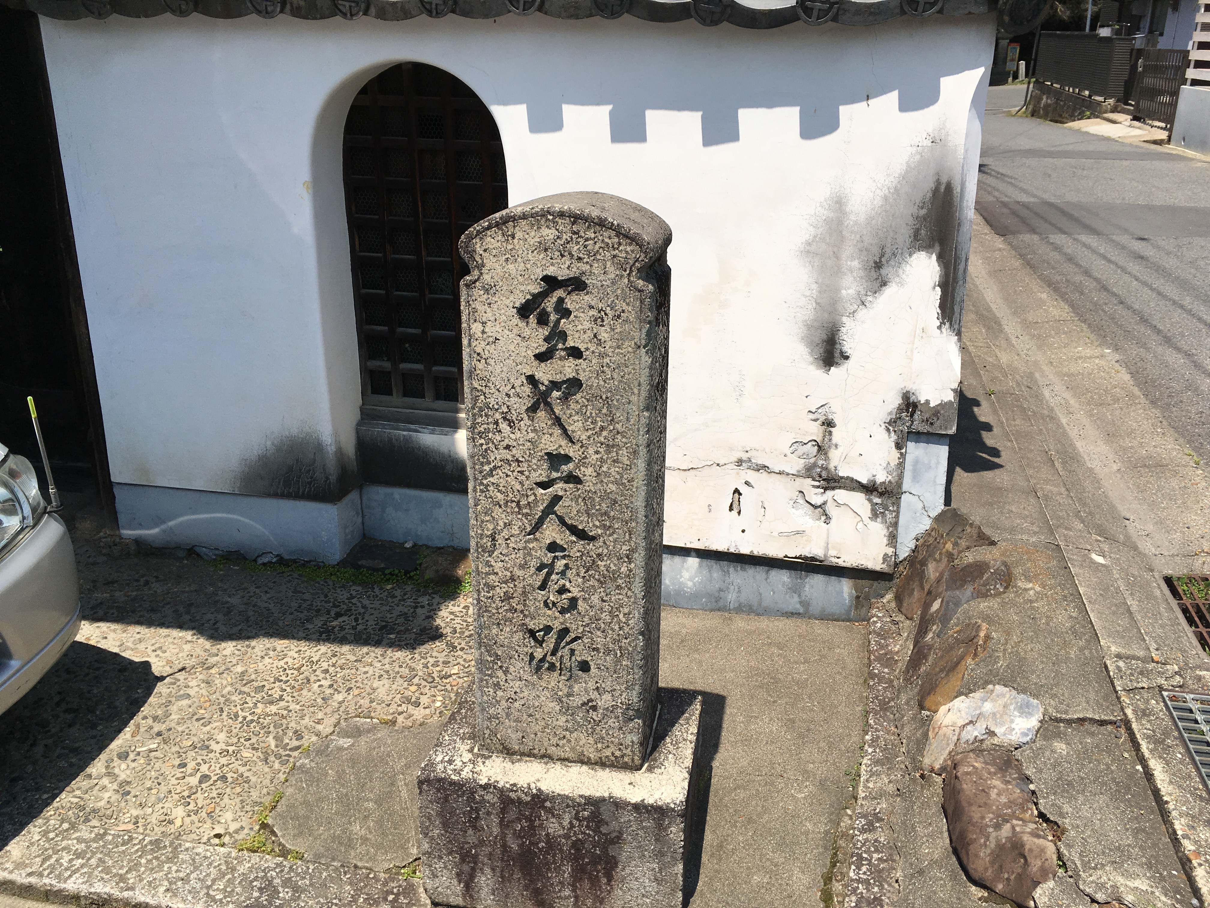 隔夜寺、奈良高畑町。空也上人の旧跡碑。